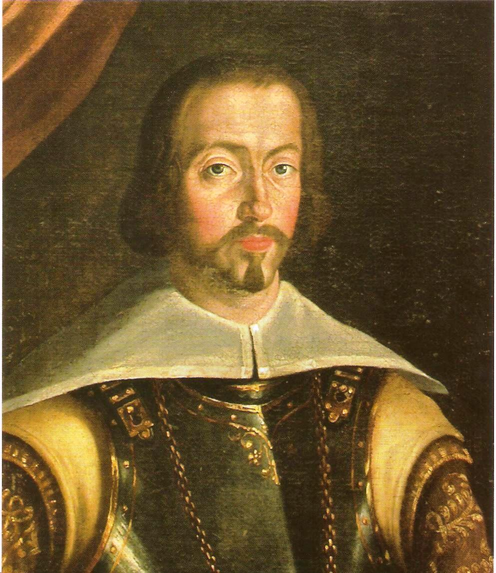 D.João IV, rei de Portugal. Atualmente no Paço de Vila Viçosa.